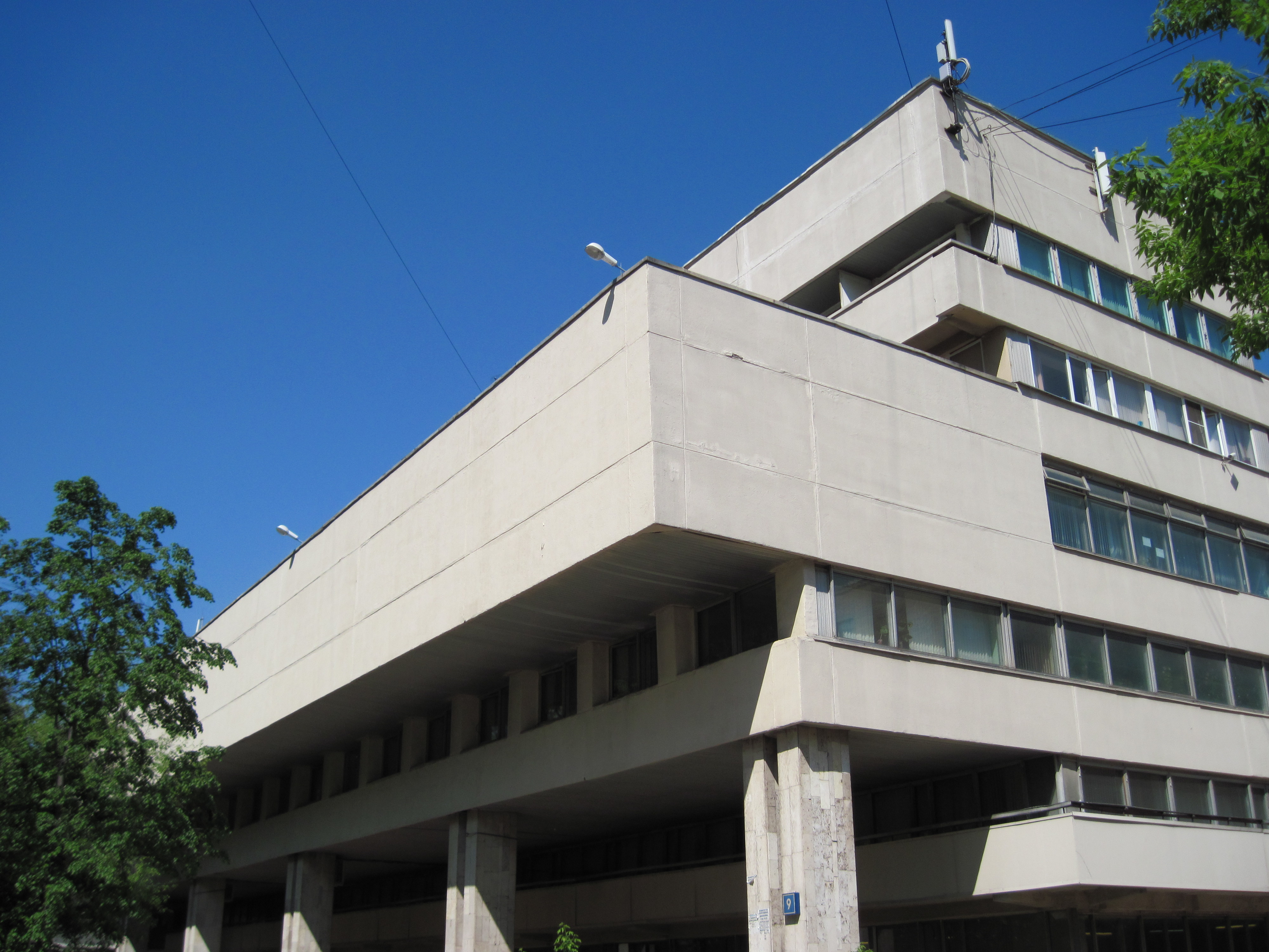 Здание РГБС